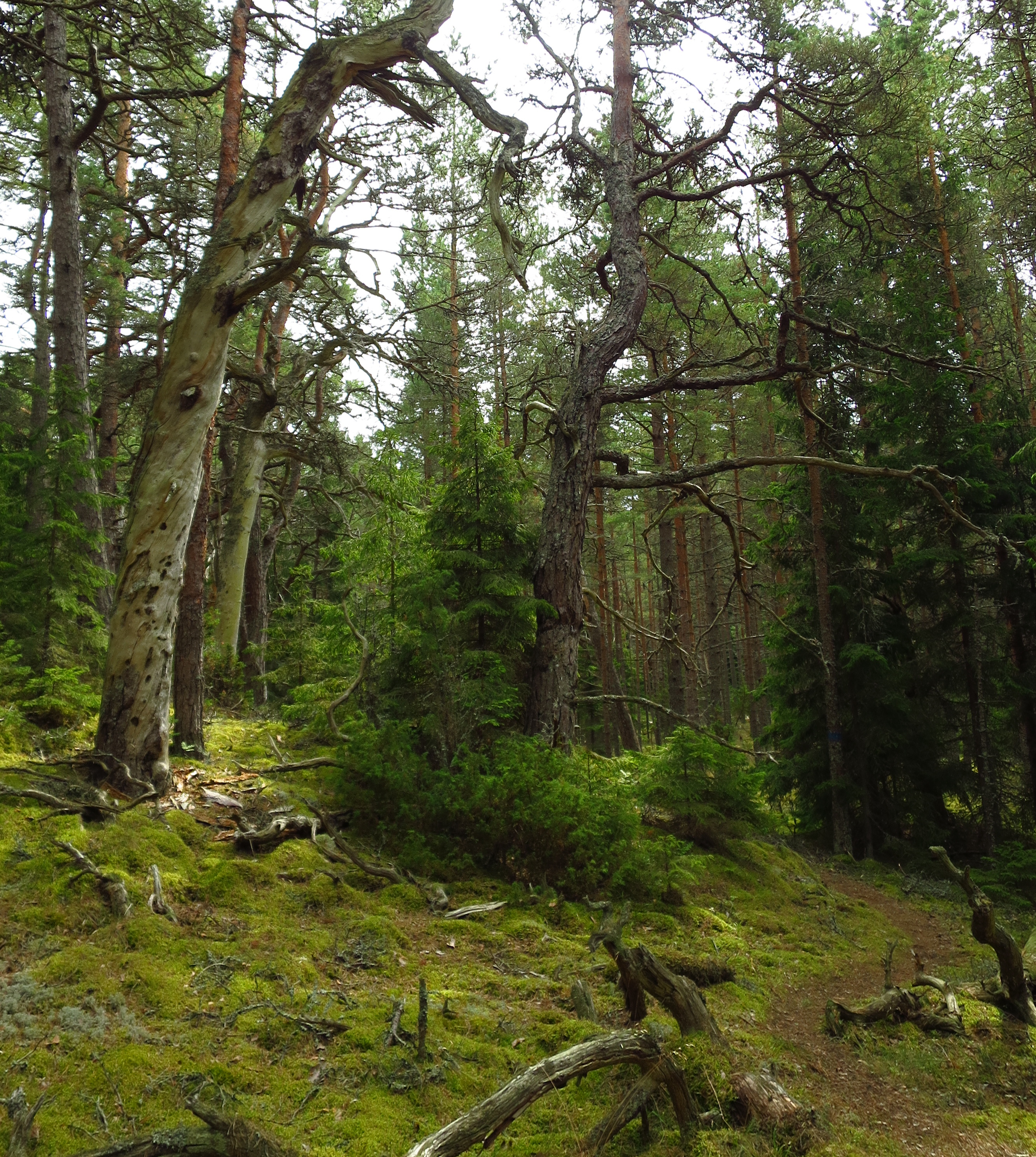 Rannamännik Kõpu looduskaitsealal